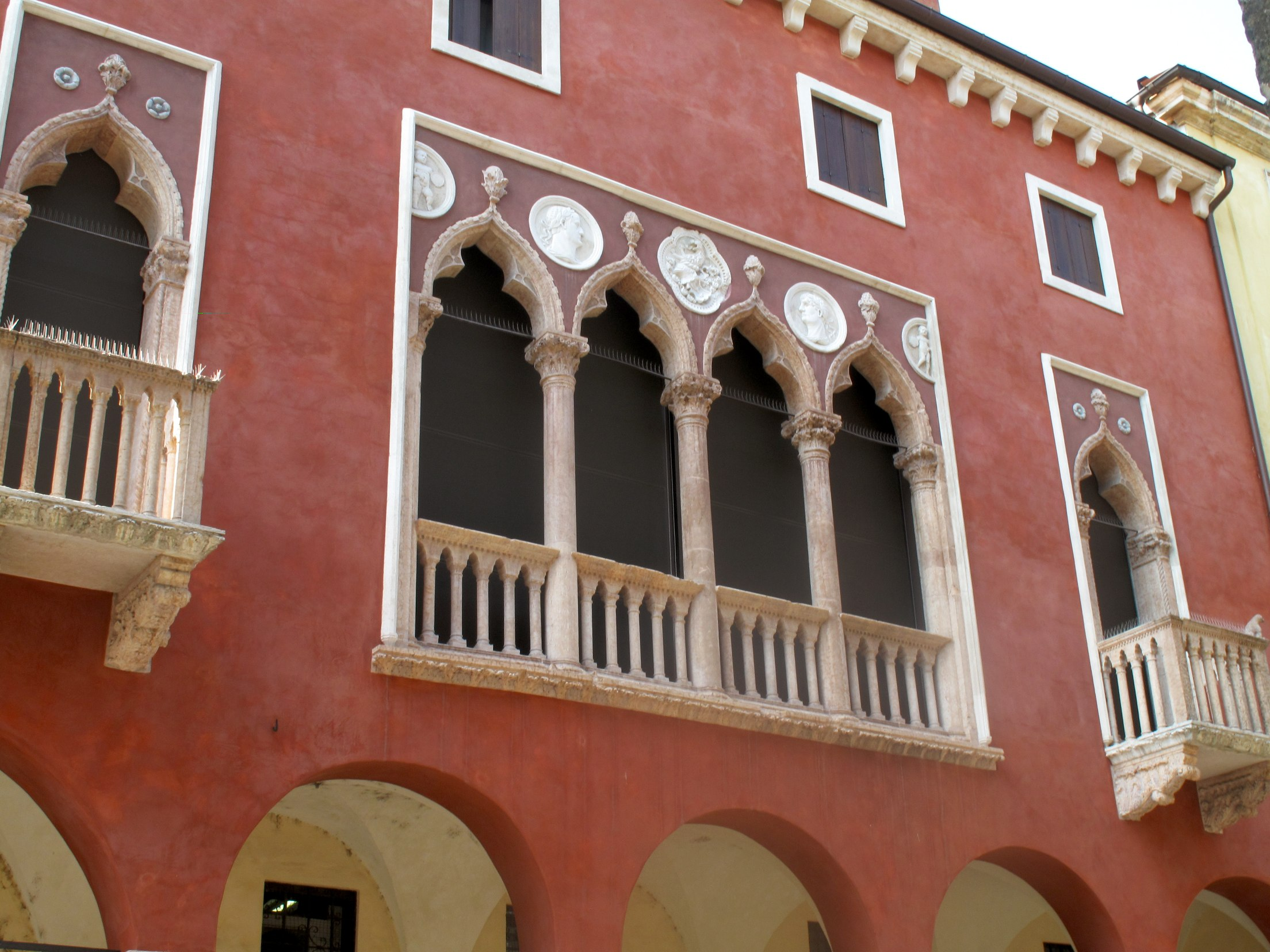 Palazzo Braschi, Vicenza, Italy